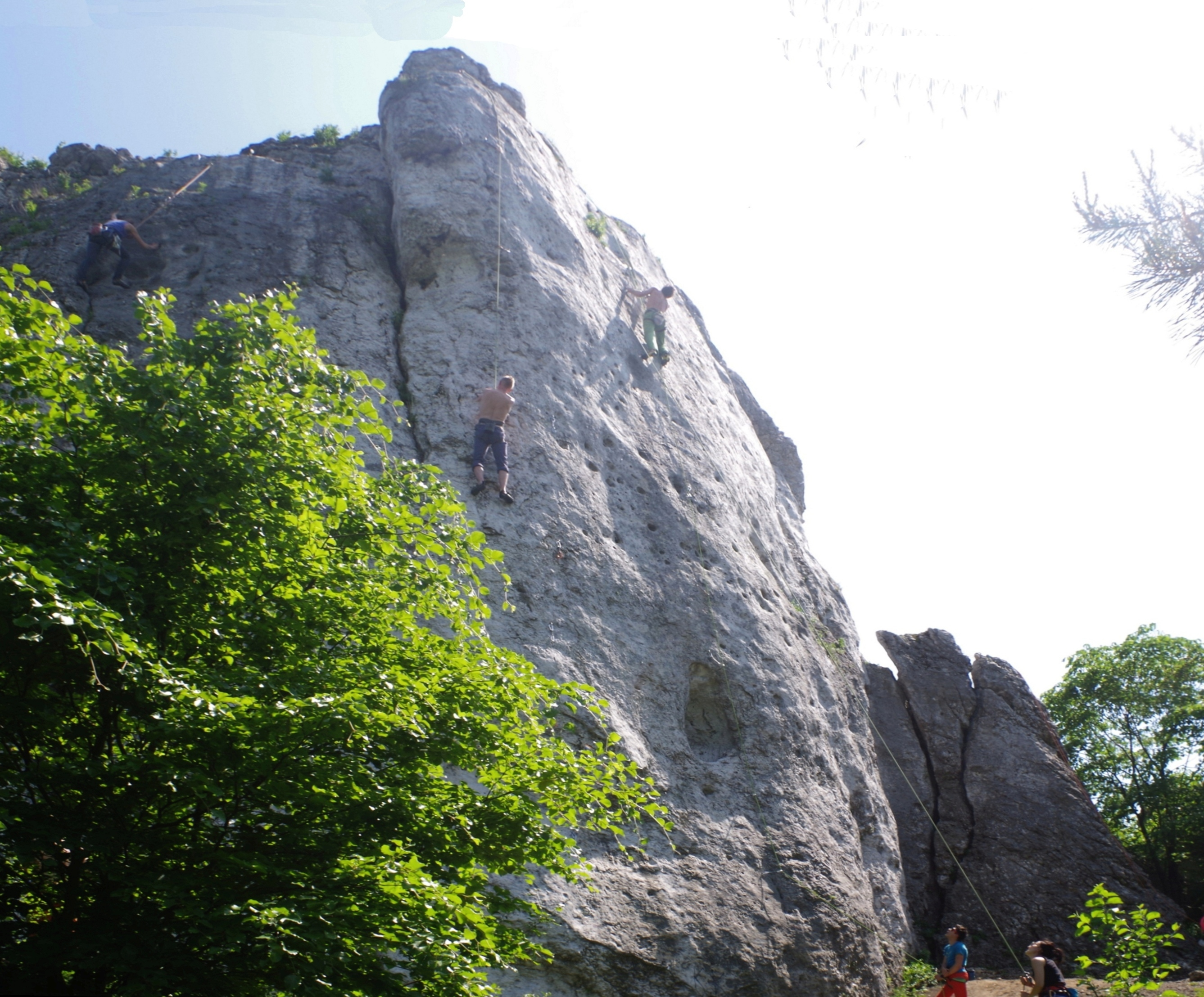 Skała Wielki Grochowiec w Ryczowie